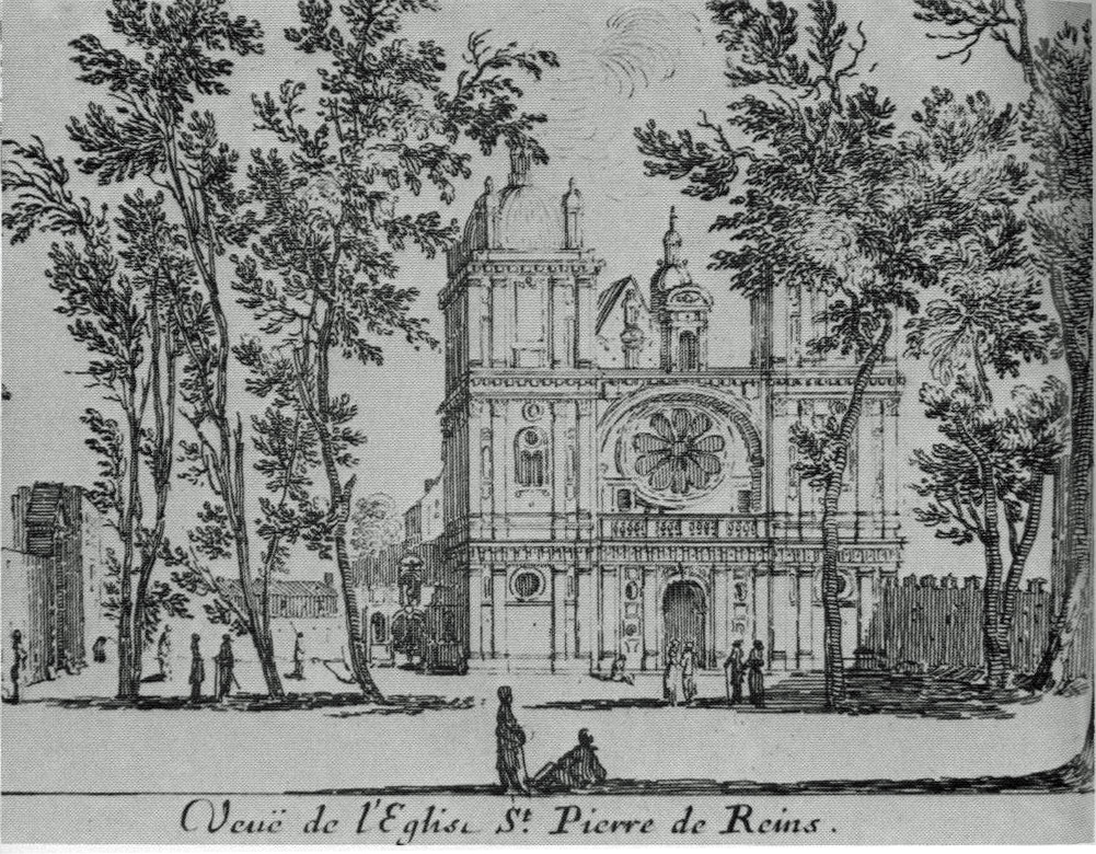 Une gravure du XIVe siècle représantant l'abbaye St Pierre les dames église aujourd'hui disparue.